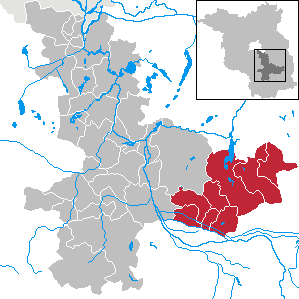 Amt Lieberose/Oberspreewald in Brandenburg, Landkreis Dahme-Spreewald